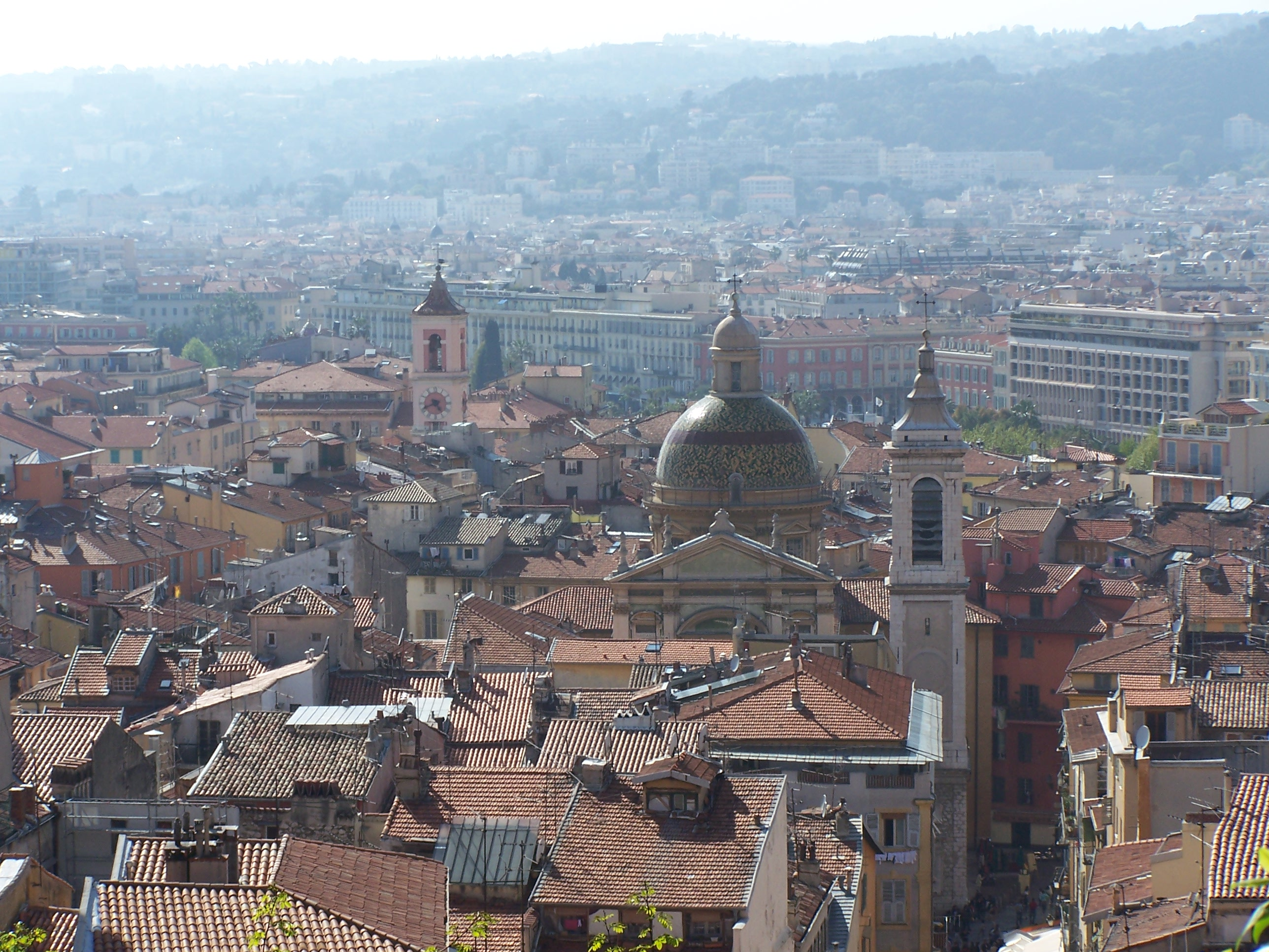 Vue du Vieux-Nice